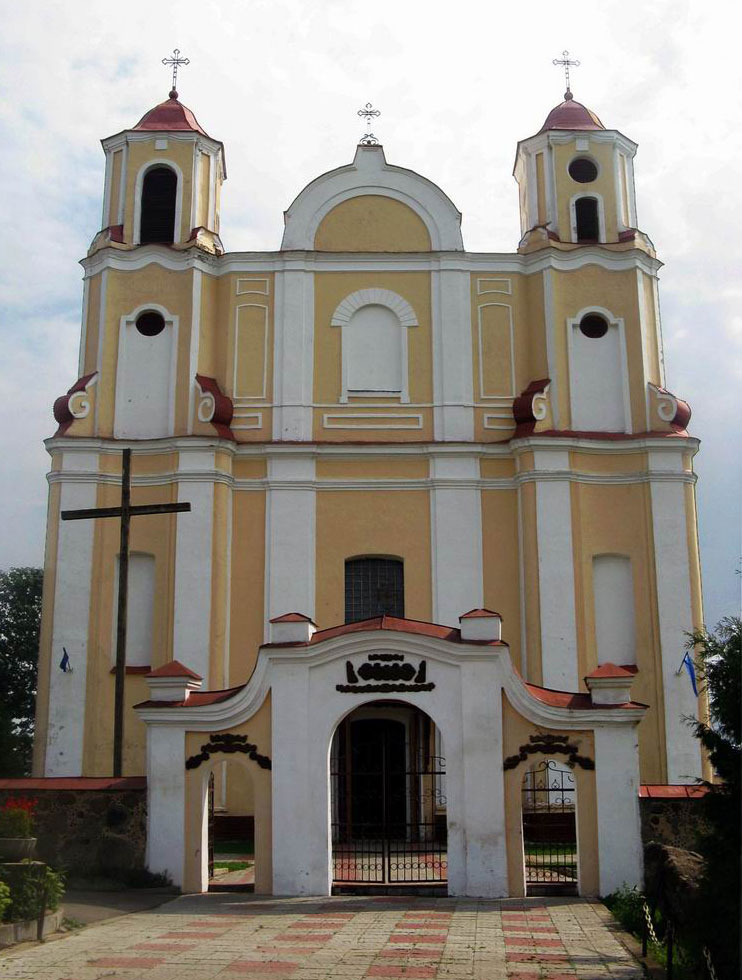 Беларуская (тарашкевіца): Васілішкі